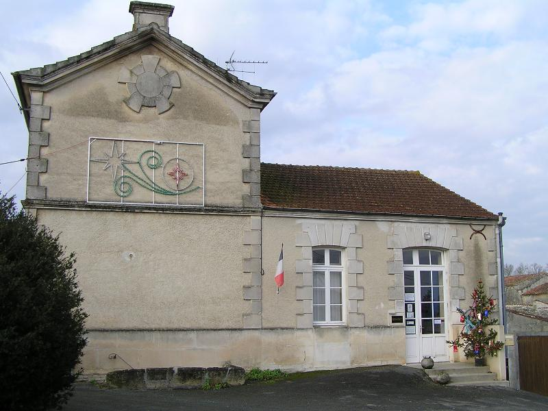 Mairies de Massac